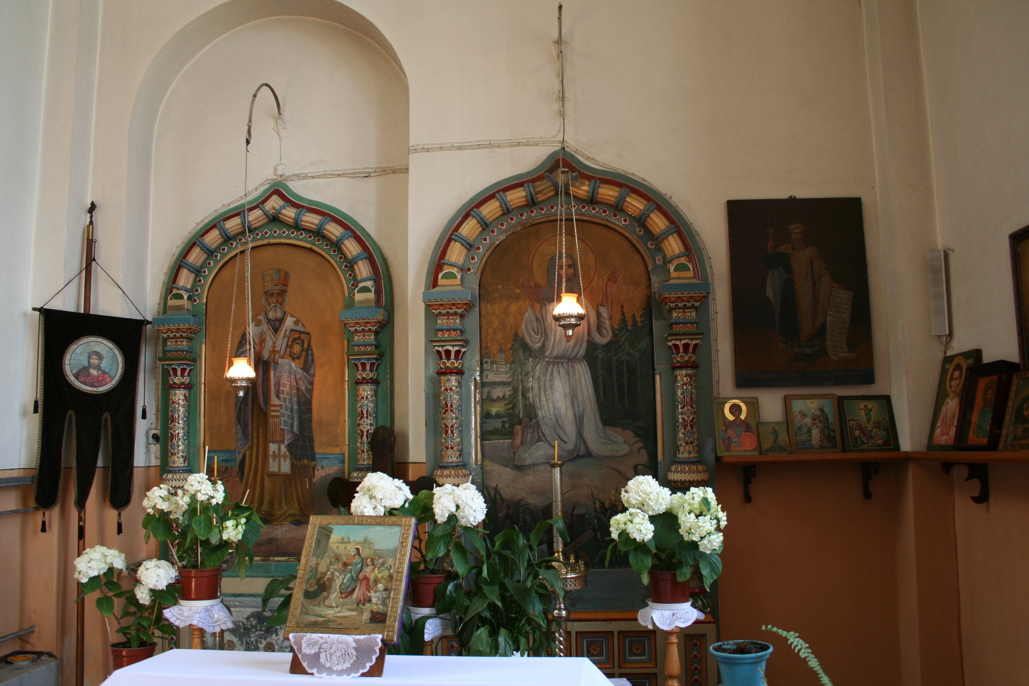 cerkiew Mikołaja Cudotwórcy w Białowieży, fragment